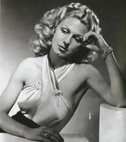 Zulema Esther González Borbón, mejor conocida como Zully Moreno, actriz argentina. (1920-1999)